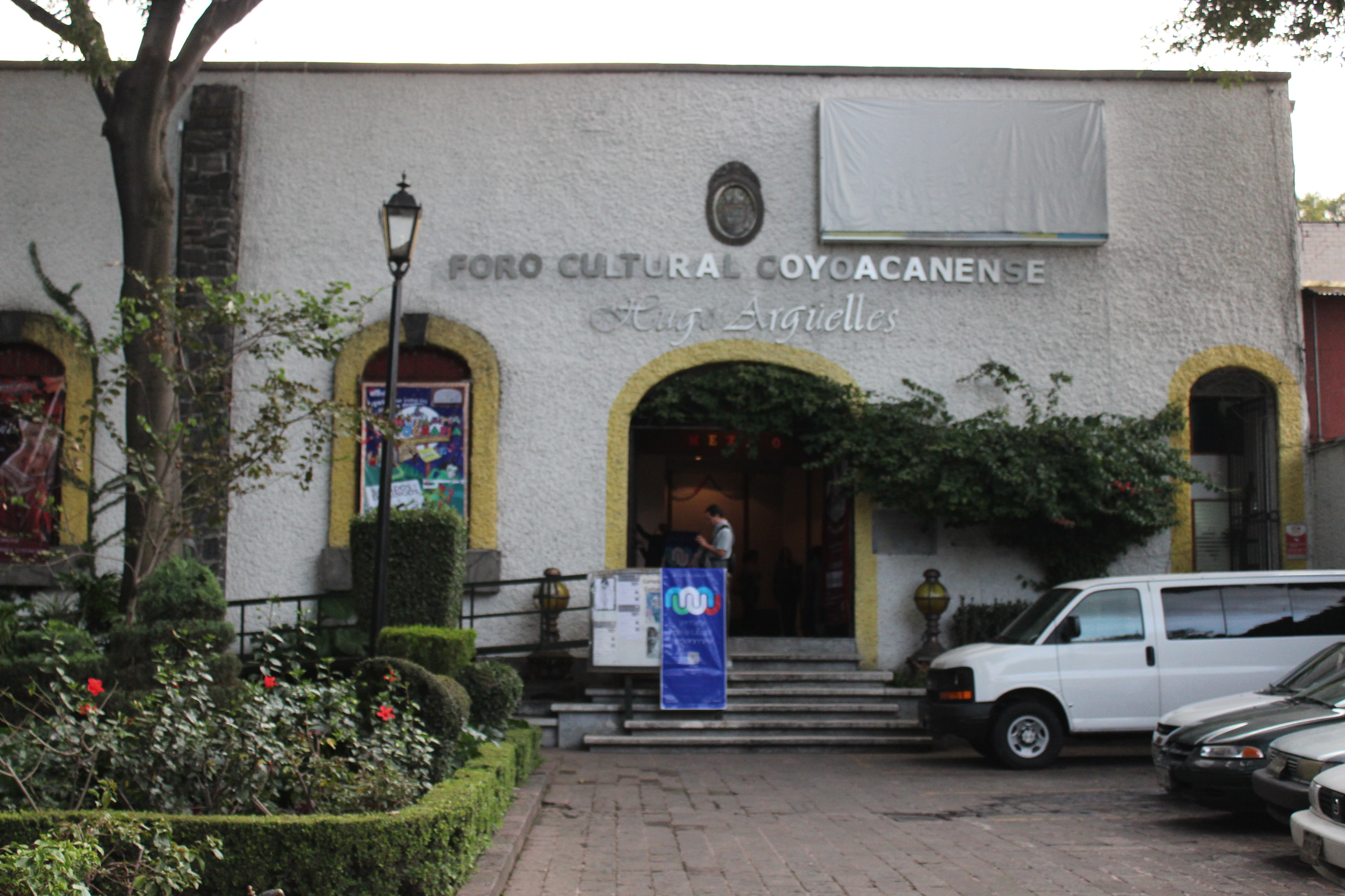 Fachada del Foro Coyoacanense